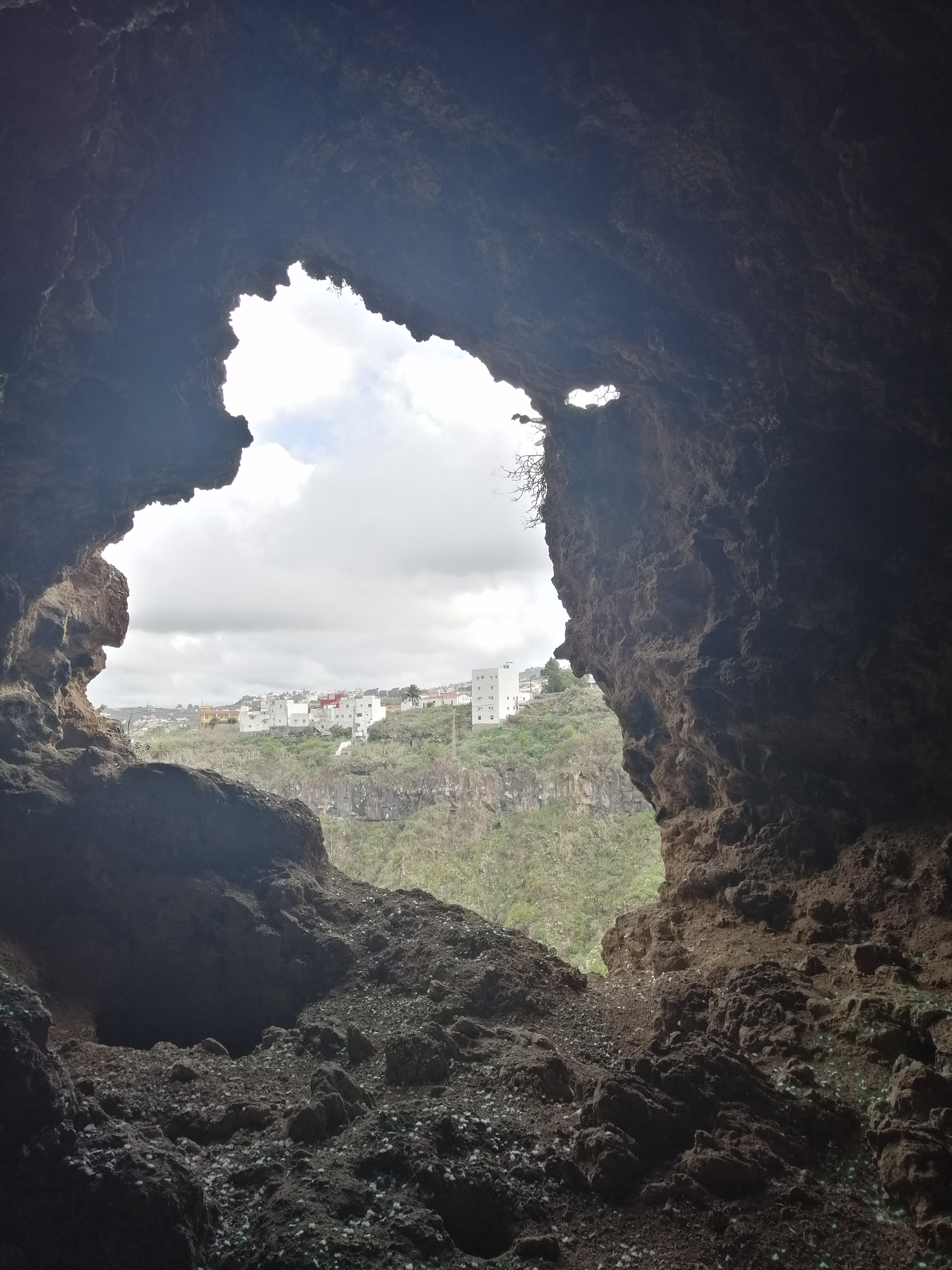 Interior de una de las cavidades